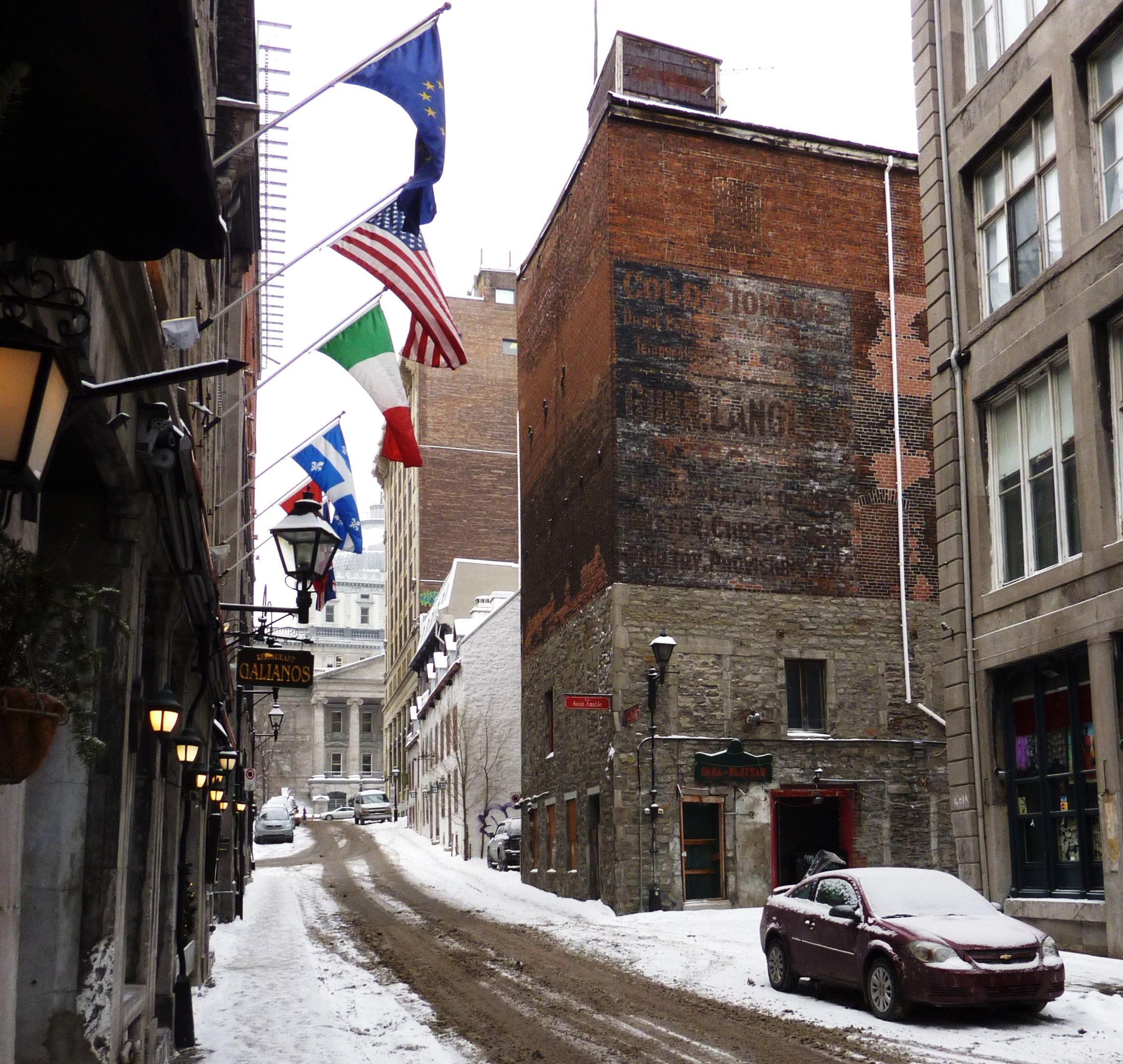 Localisation et environnement de la signalisation fantôme / Ghost Sign. Détail: On remarque que le bâtiment sur lequel figure la publicité peinte, a été construit (avant 1910) par dessus un autre très ancien (env. 1800- 1830). Ce qui confirme la solidité de cette structure de pierres.